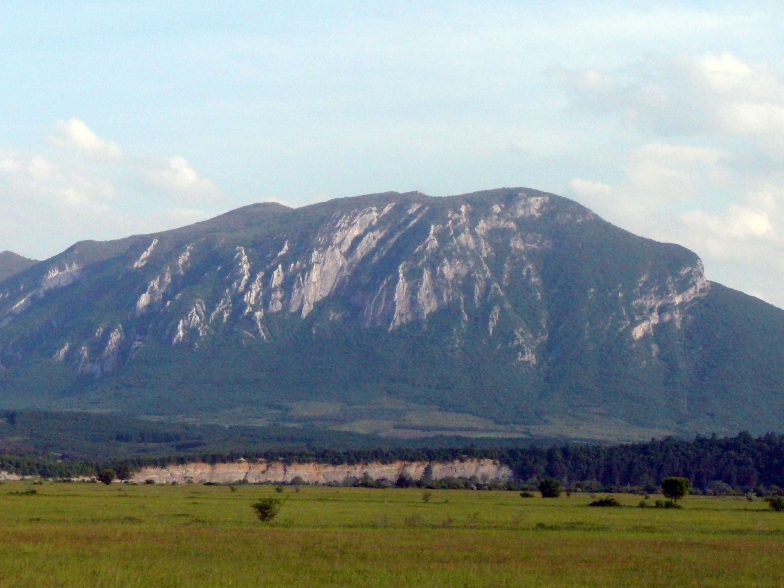 Vrachanski Balkan,Bulgaria